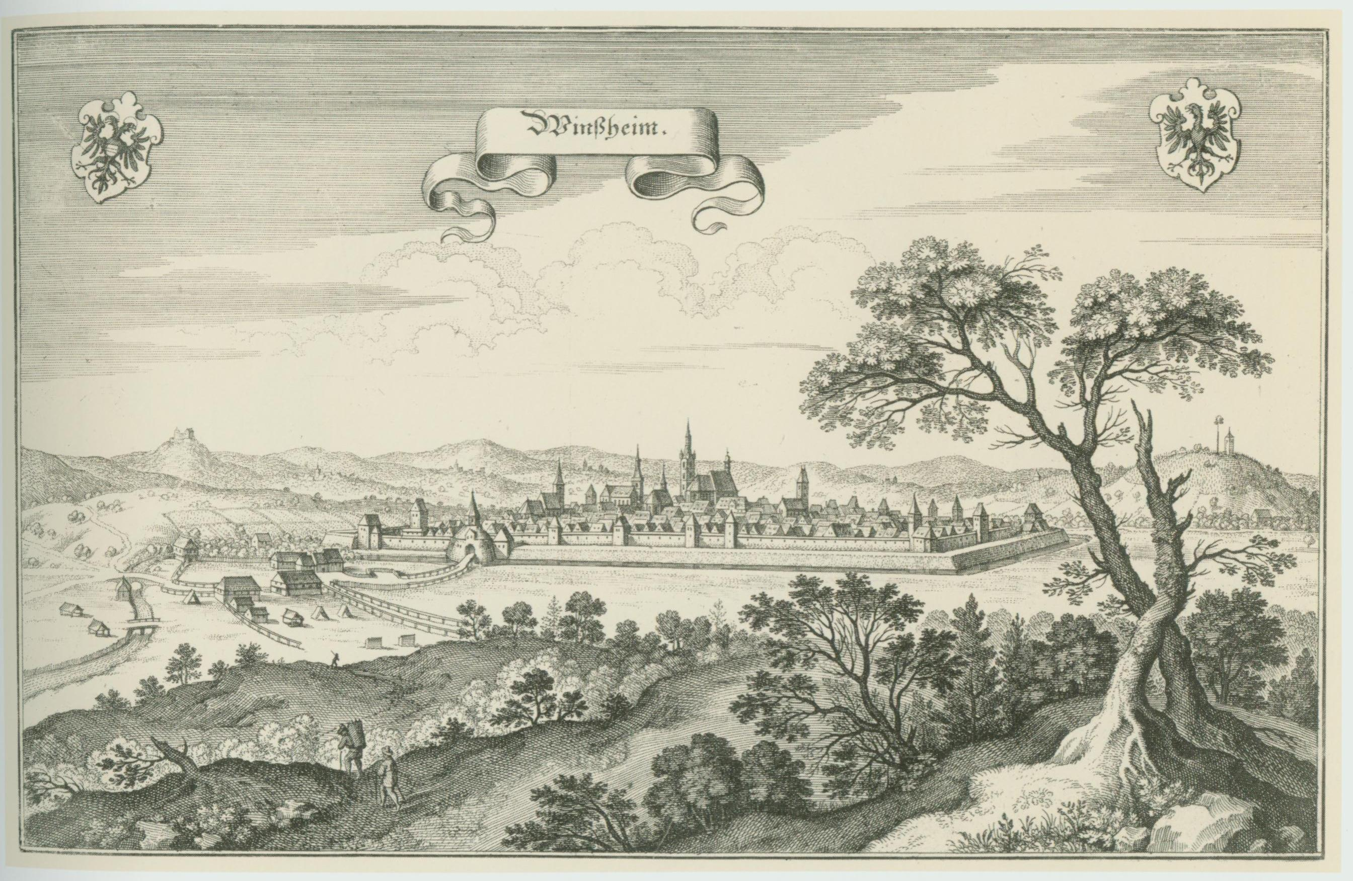 Bad Windsheim in Mittelfranken/Bayern; Kupferstich Merian "Topographia Franconiae" 17. Jhdt.